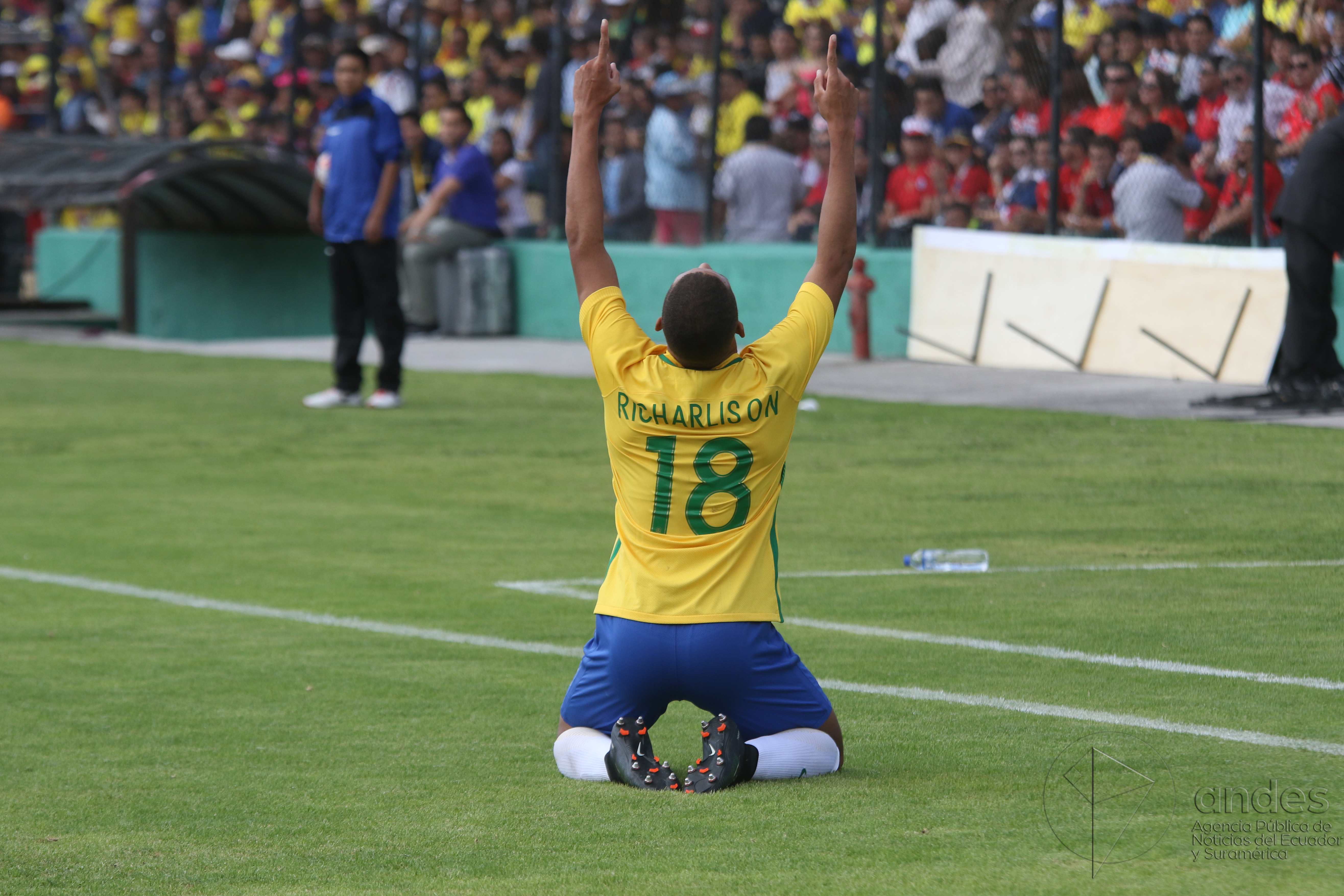 BRASIL PARAGUAY SUB 20 3 MAV